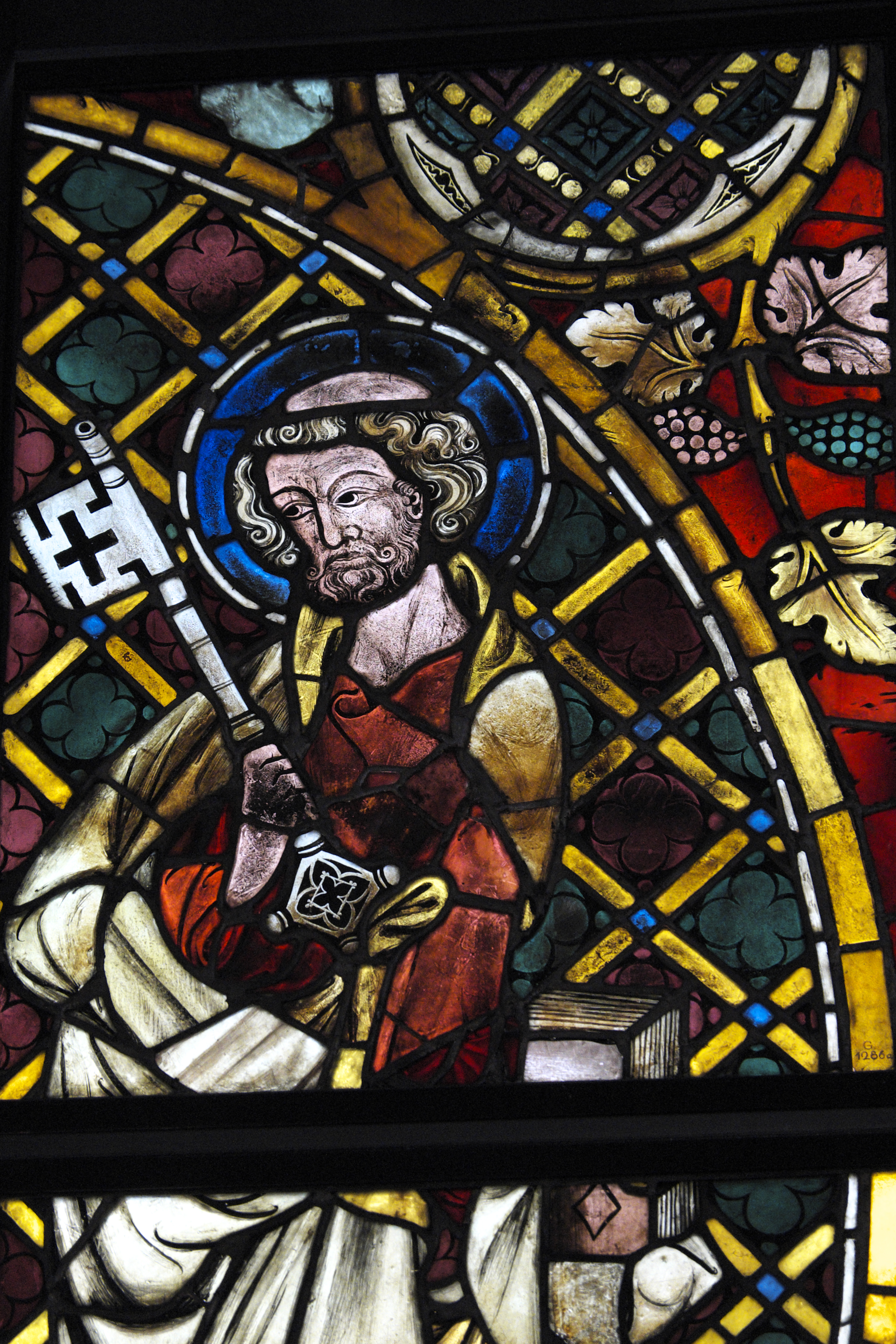 Bayerisches Nationalmuseum in München, Bleiglasfenster aus dem Kloster Hauterive im Schweizer Kanton Freiburg, um 1340, Darstellung: Apostel Petrus